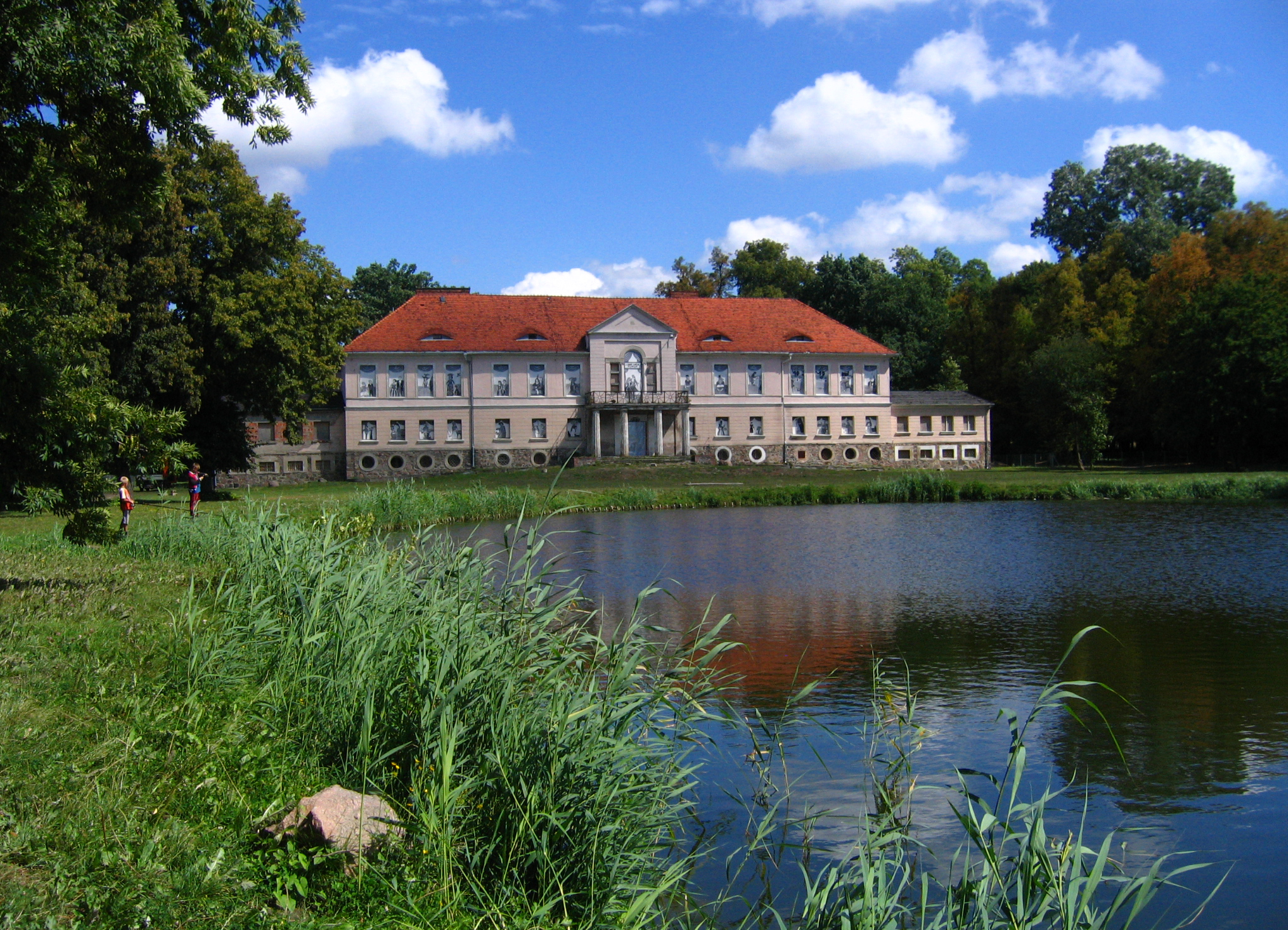 von Treskow Palace, Owińska, Poland